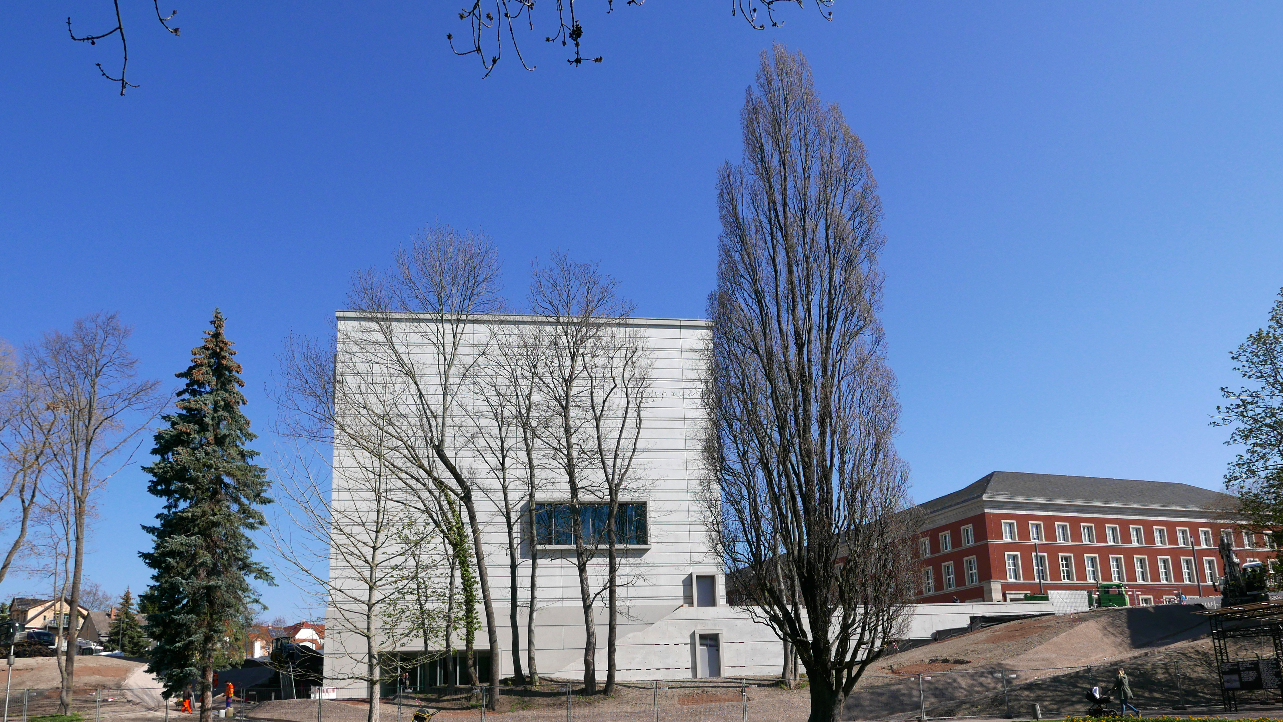 Neubau des Bauhaus-Museums in Weimar, April 2019, kurz nach der Eröffnung